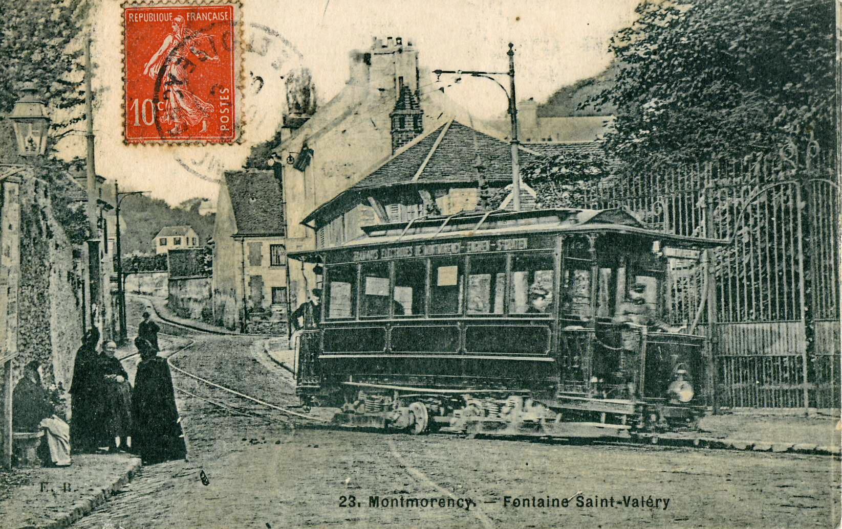 Carte postale ancienne éditée par EB, n°23MONTMORENCY - Fontaine Saint-ValéryVue en gros plan du Tramway Enghien - Montmorency